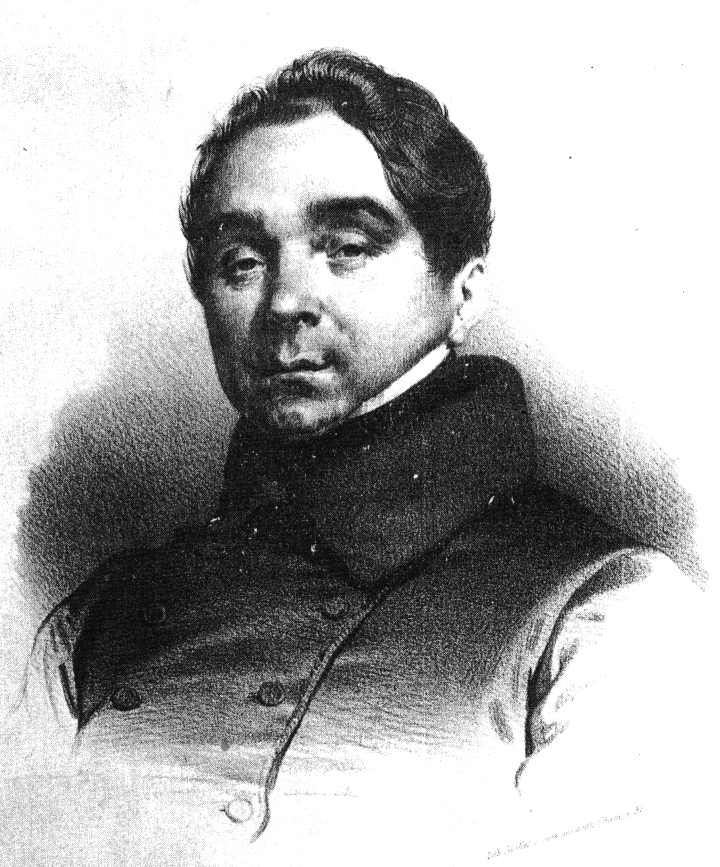 Portrait du chef d'orchestre et compositeur français Philippe Musard (Tours, 1792 - Paris, 1859). Sa musique était célèbre dans le monde entier. Elle était notamment jouée dans le cadre du très grand Carnaval de Paris.